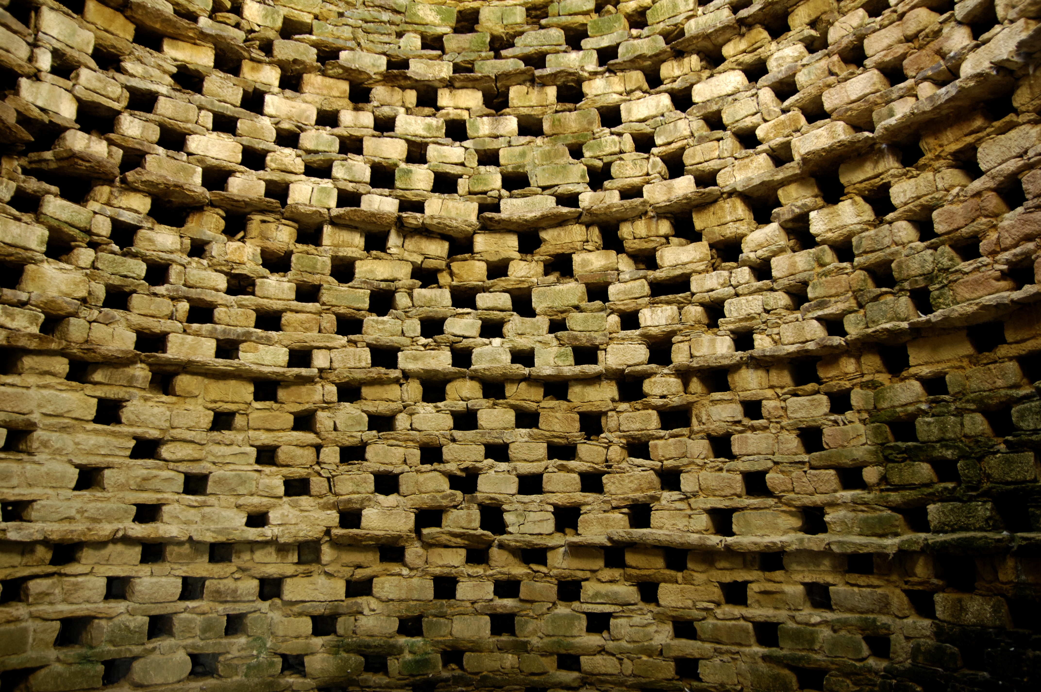 Suscinio, Rundbau (Taubenhaus?), hier: Detailaufnahme der Struktur der Mauern